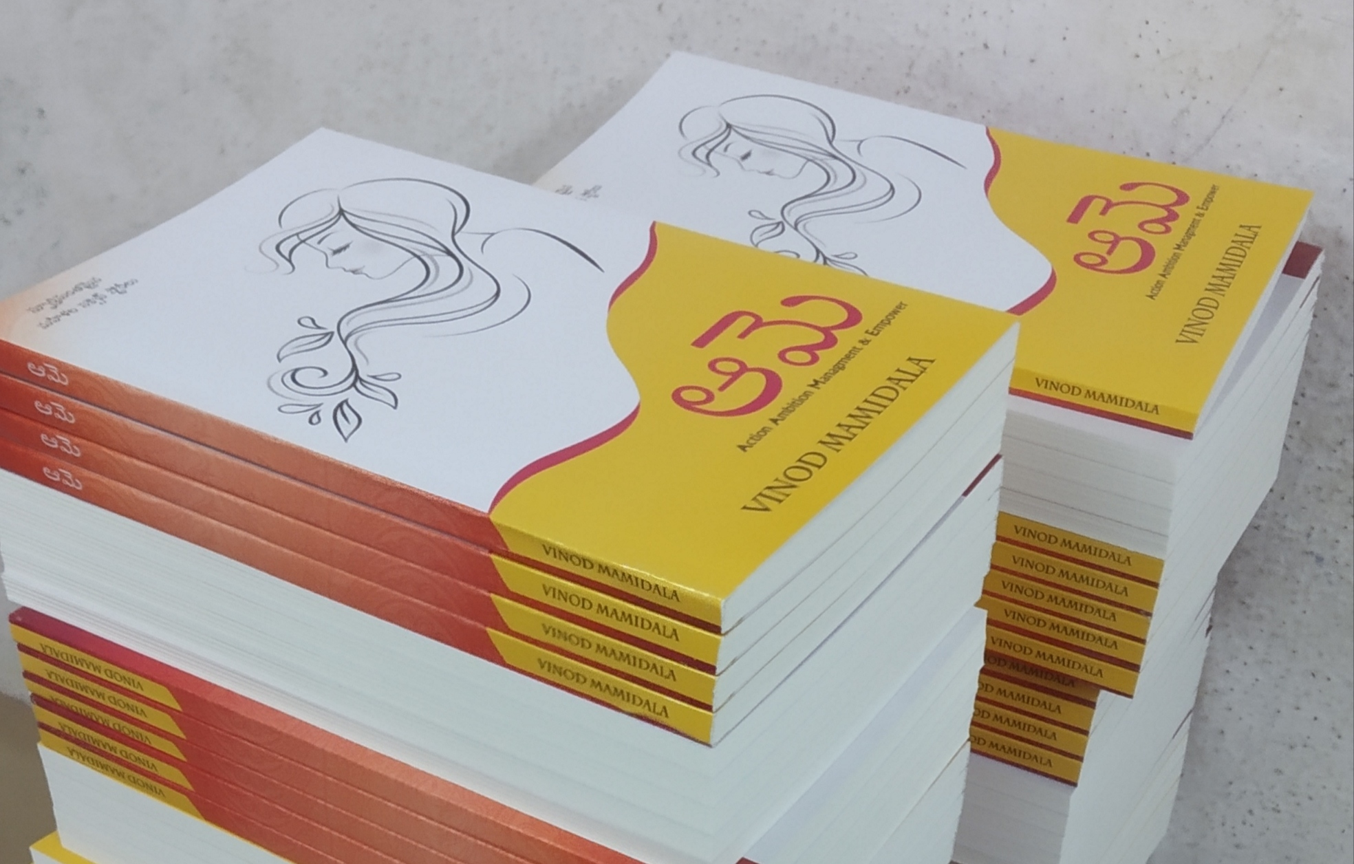 vinod mamidala book aame